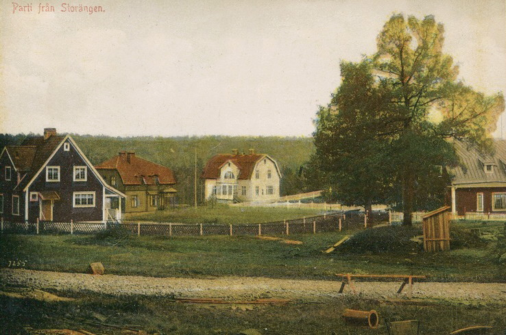 Storängen: Bilden är tagen från korsningen John Lodéns väg/Storängsvägen.